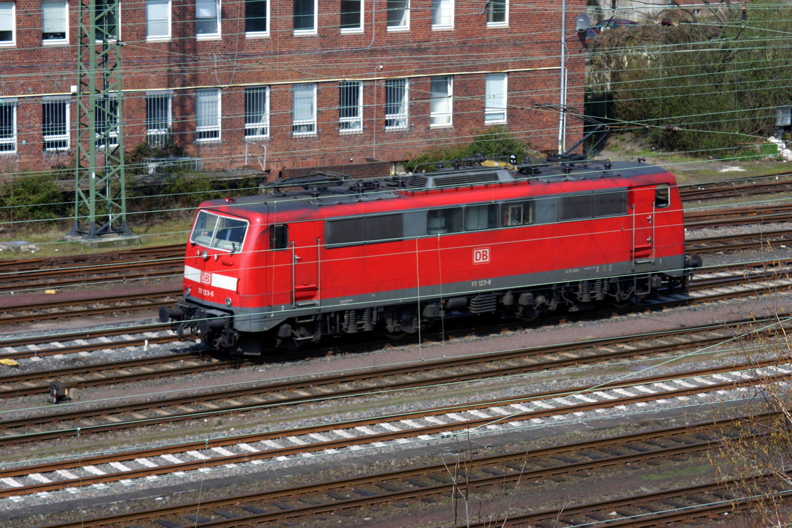 111 123-6 in Münster (Westfalen)